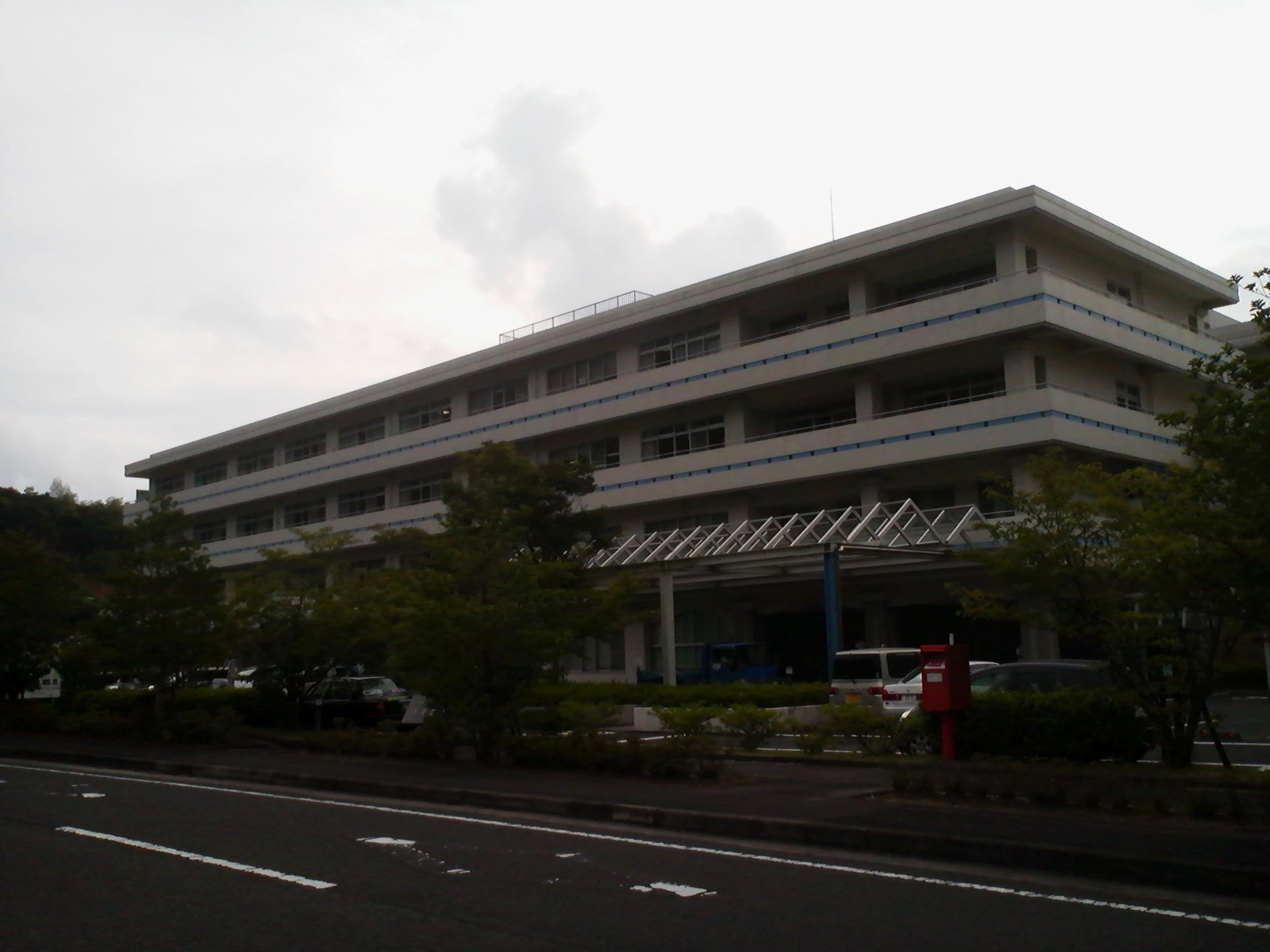 鹿児島県薩摩川内市にある川内市医師会立市民病院の外観。